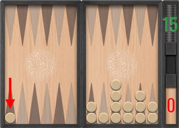 Марс в нардах